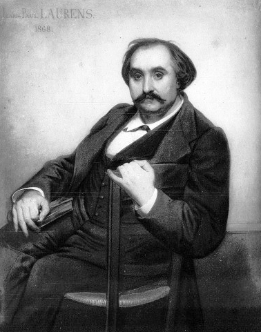 Portrait d'Émile Blémont (1827-1898) par Jean-Paul Laurens (1838-1921)